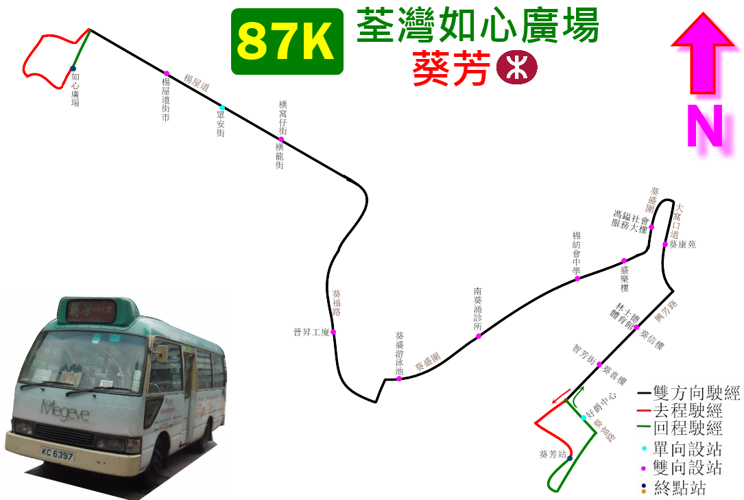 中文（香港）: 新界專線小巴87K的走線圖